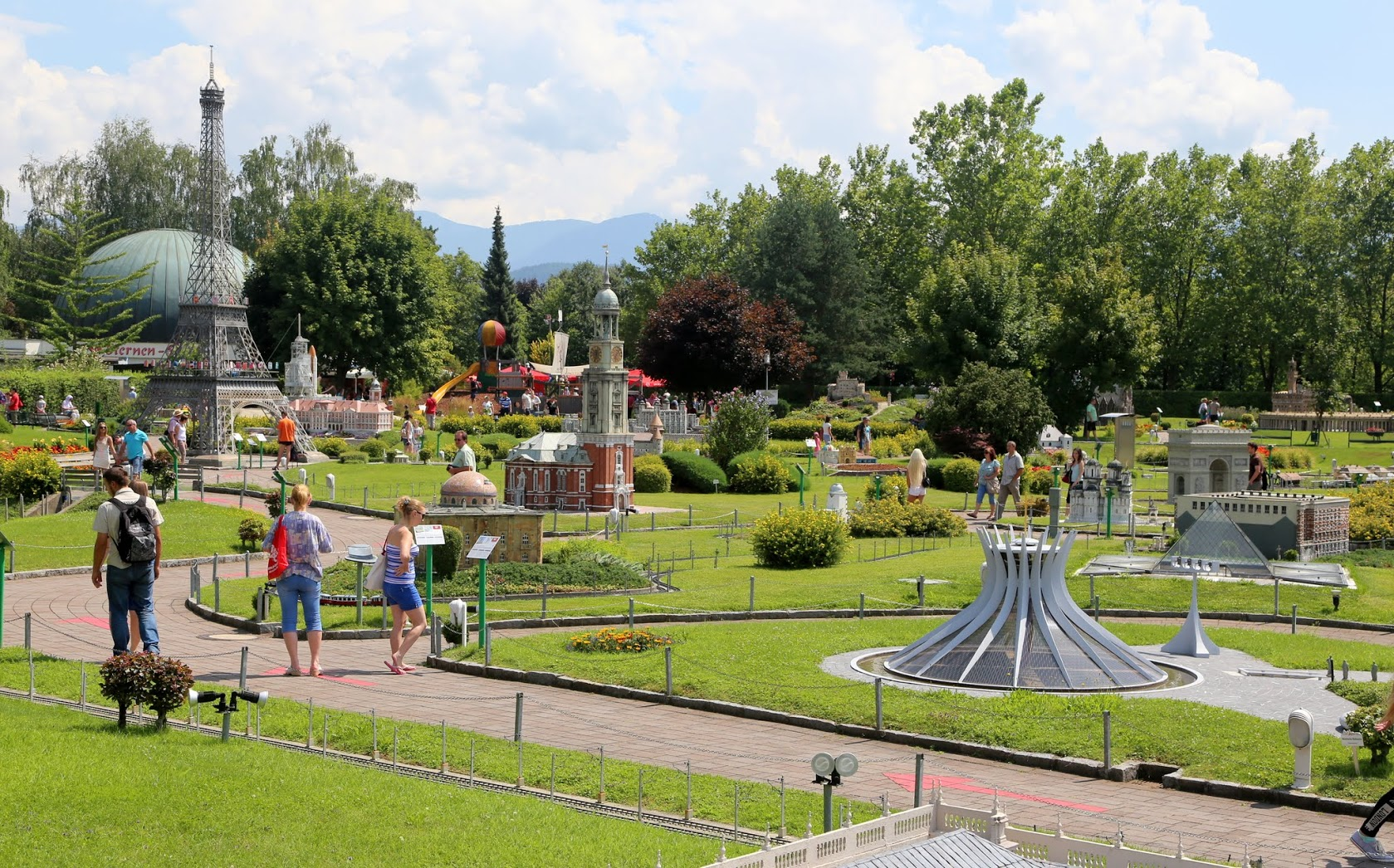 Minimundus Klagenfurt